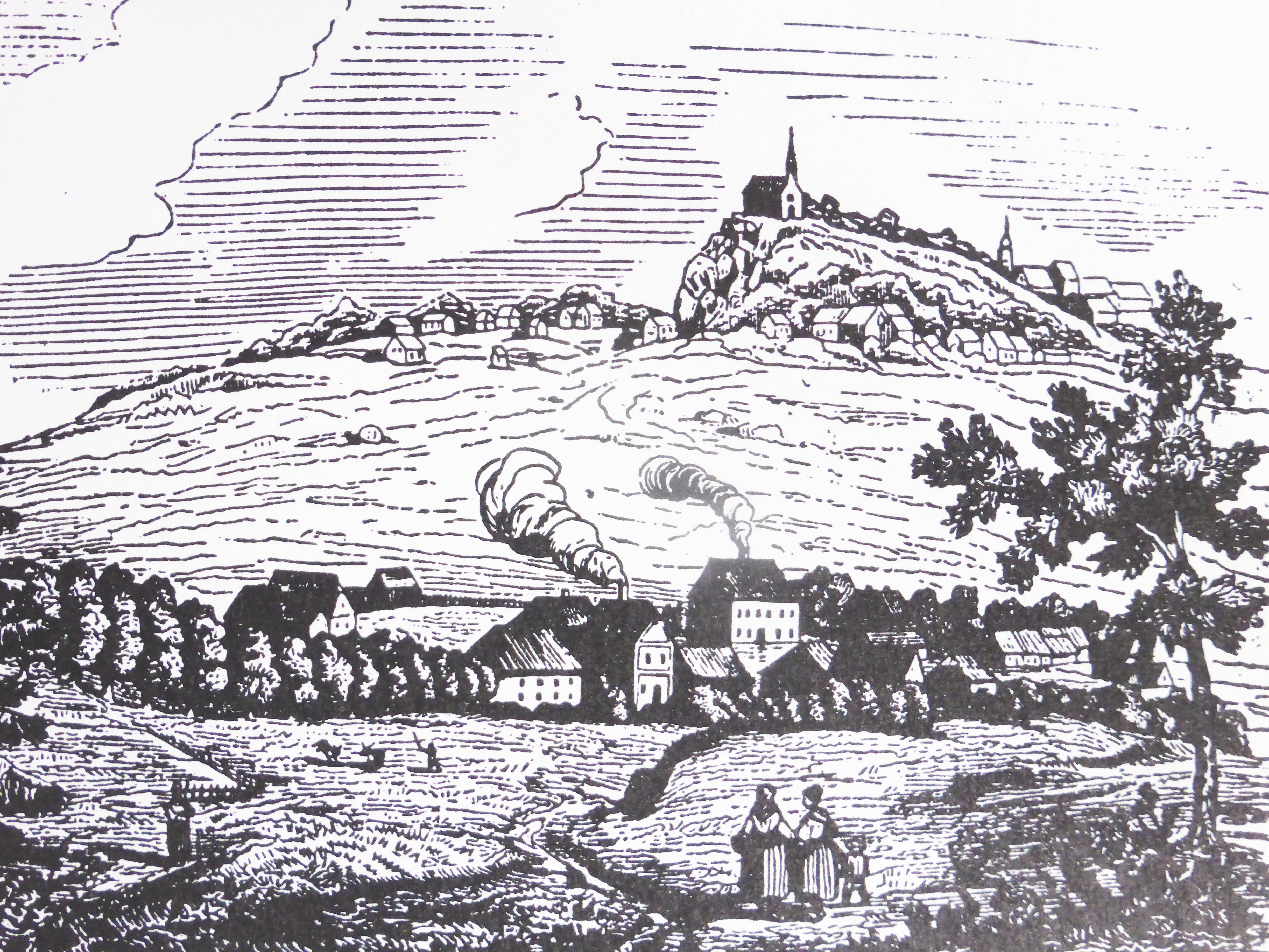 Zeichnung der Kreuzbergkirche Pleystein mit dem Finkenhammer im Vordergrung (1853)